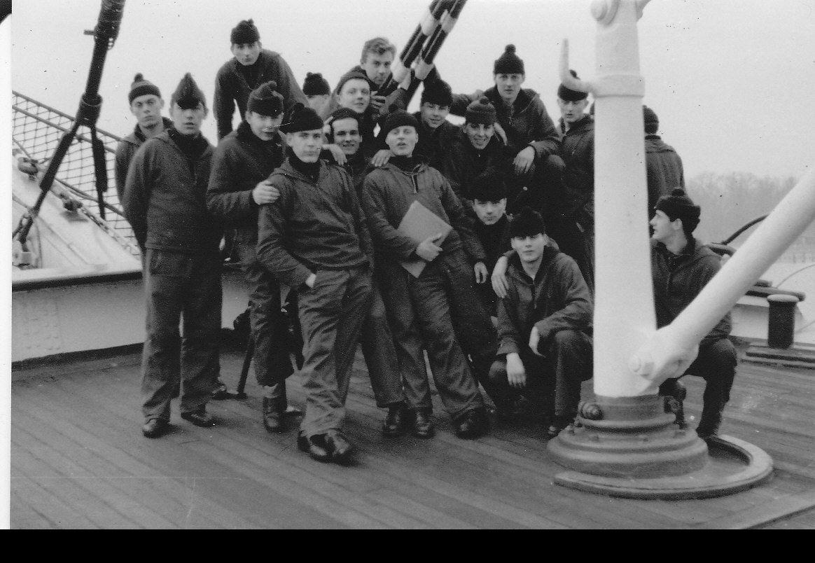 Lehrgang 108, 1961-62 SS Passat